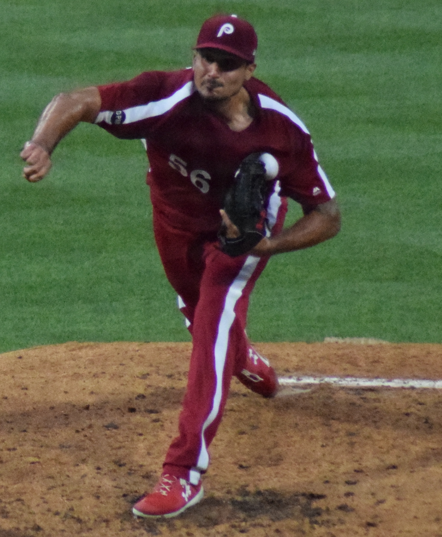 Zach Eflin